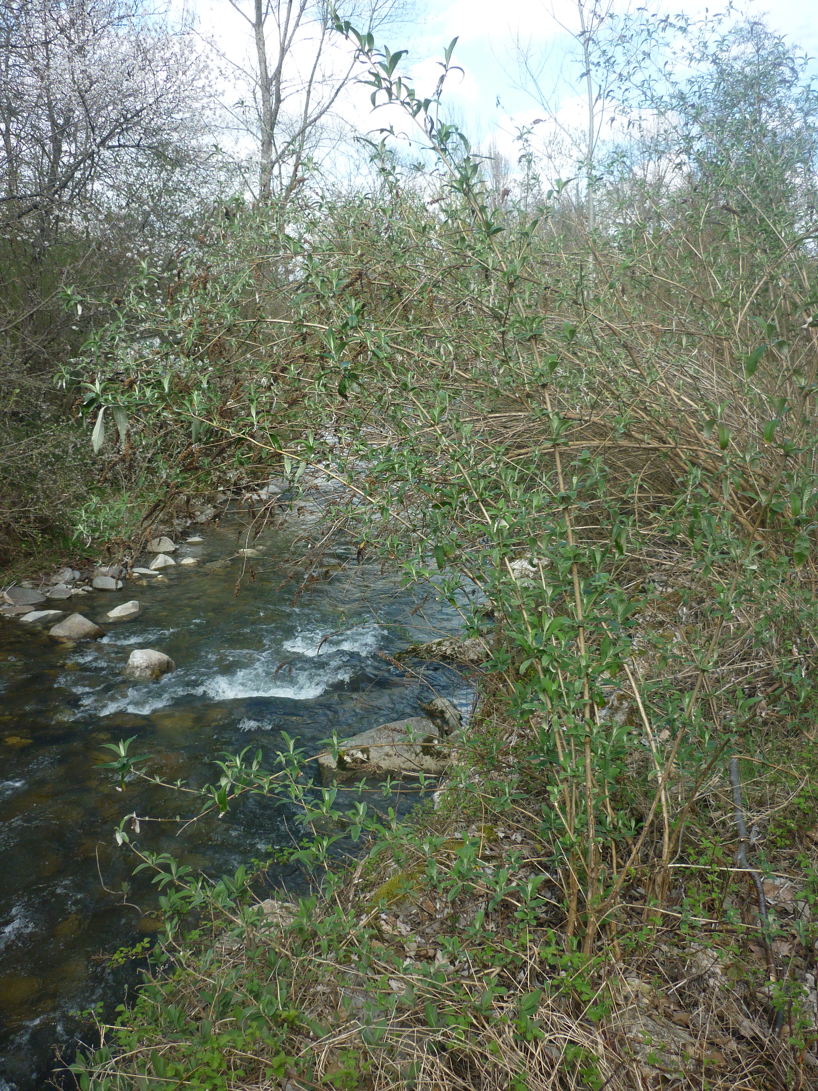 le buddleia de David est une plante très invasive responsable de la banalisation des berges, ici un cours d'eau en Ariège